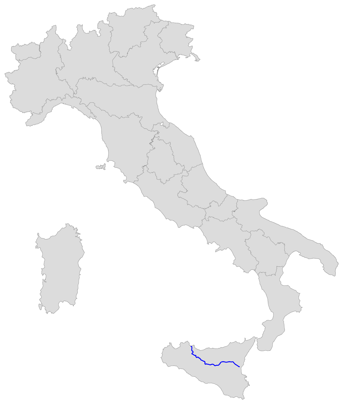 Percorso della SS 121 Catanese